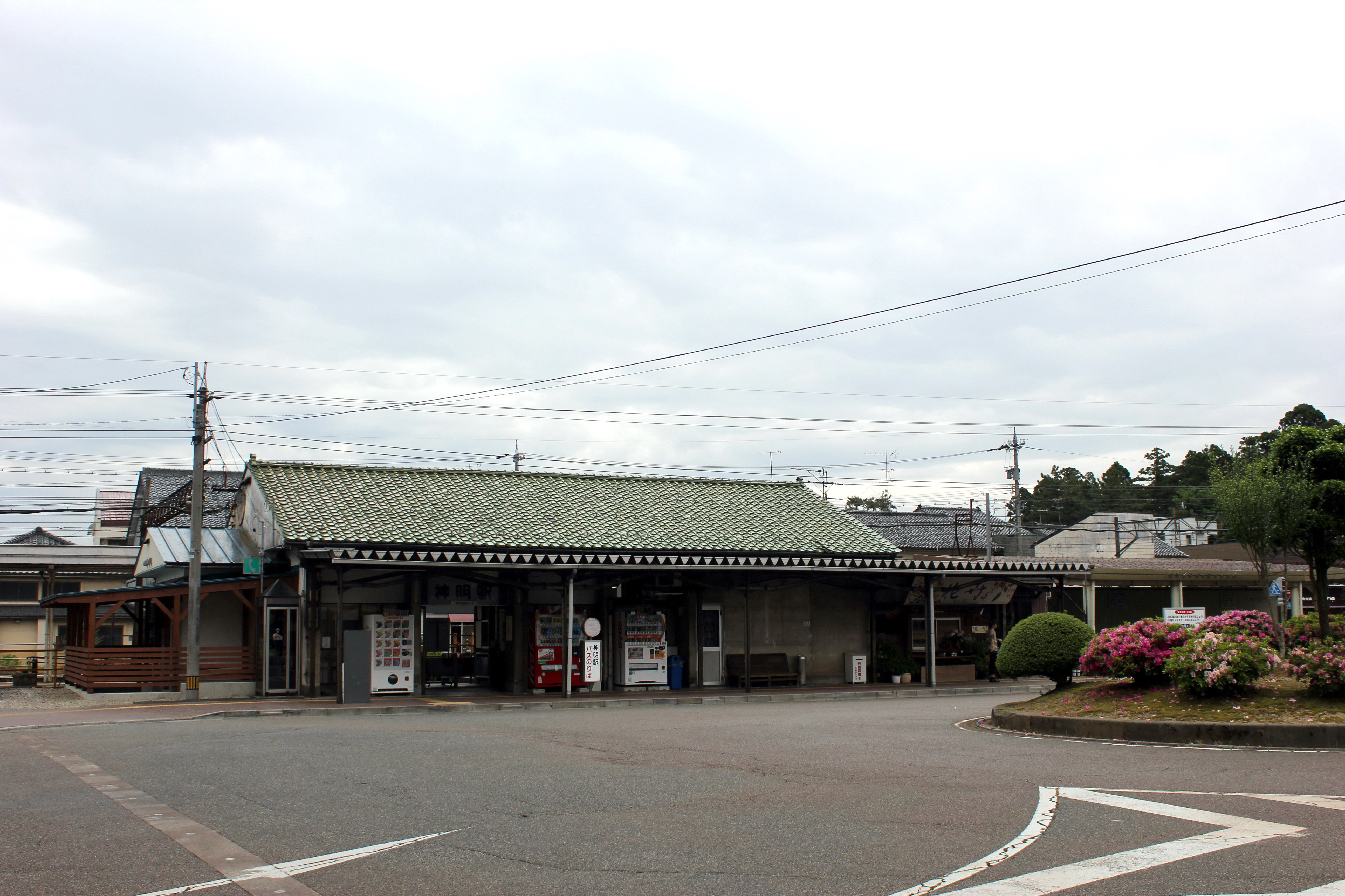 神明駅（福井鉄道）